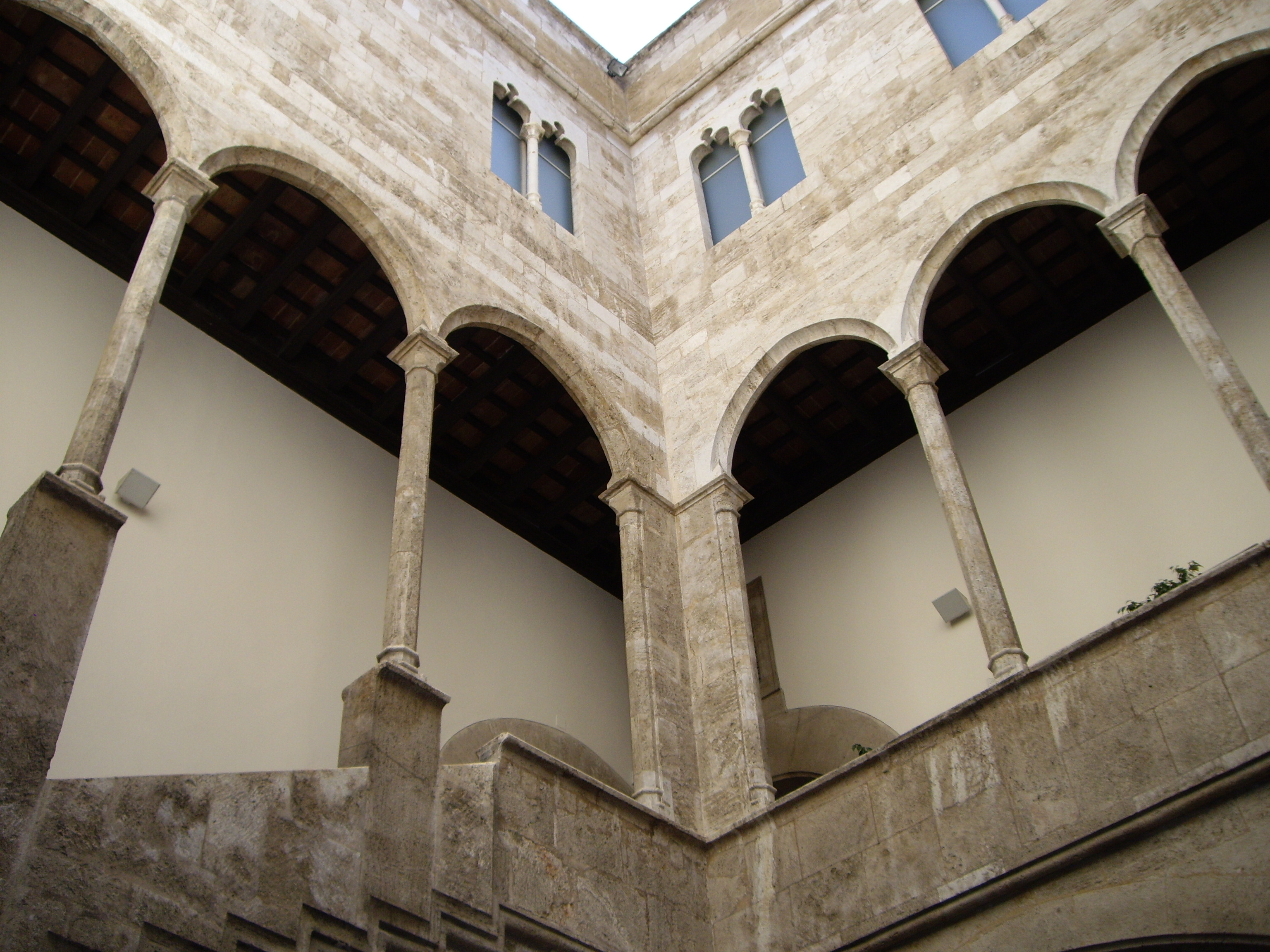 Pati del palau de l'Almirall, València.